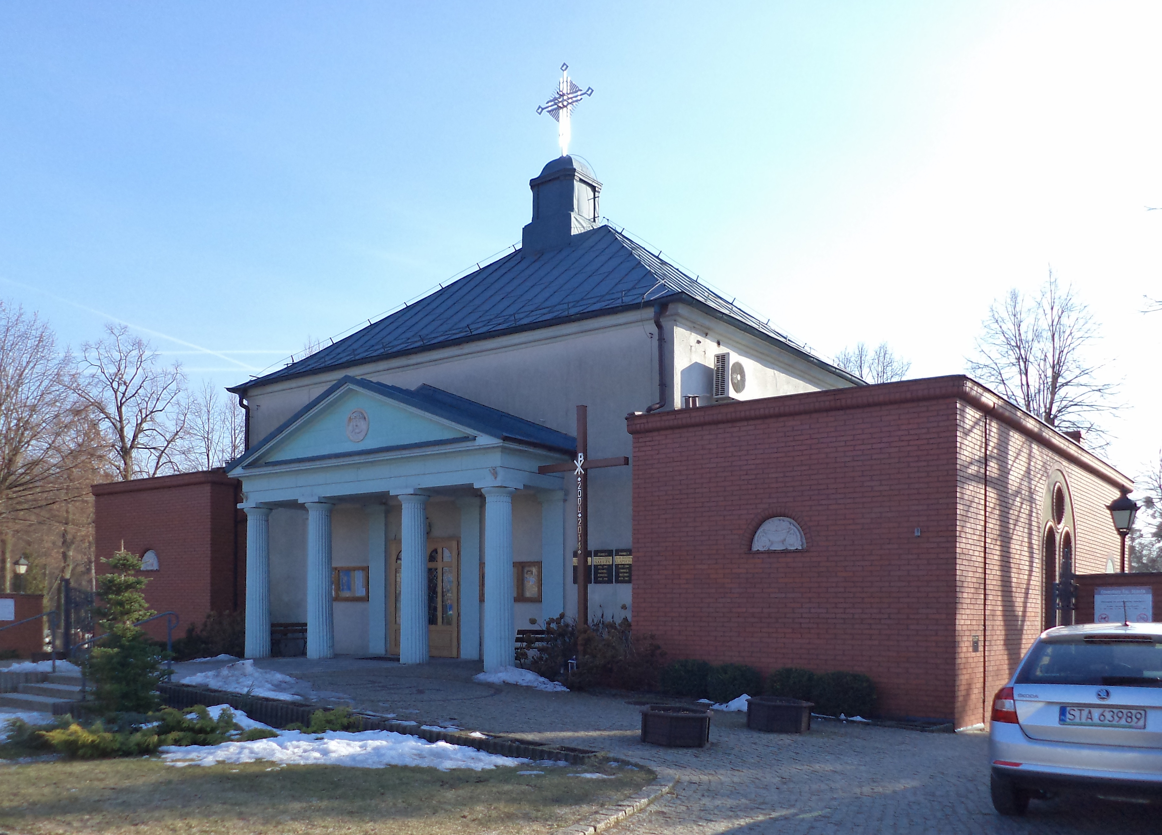 Kościół św. Józefa Robotnika w Tarnowskich Górach